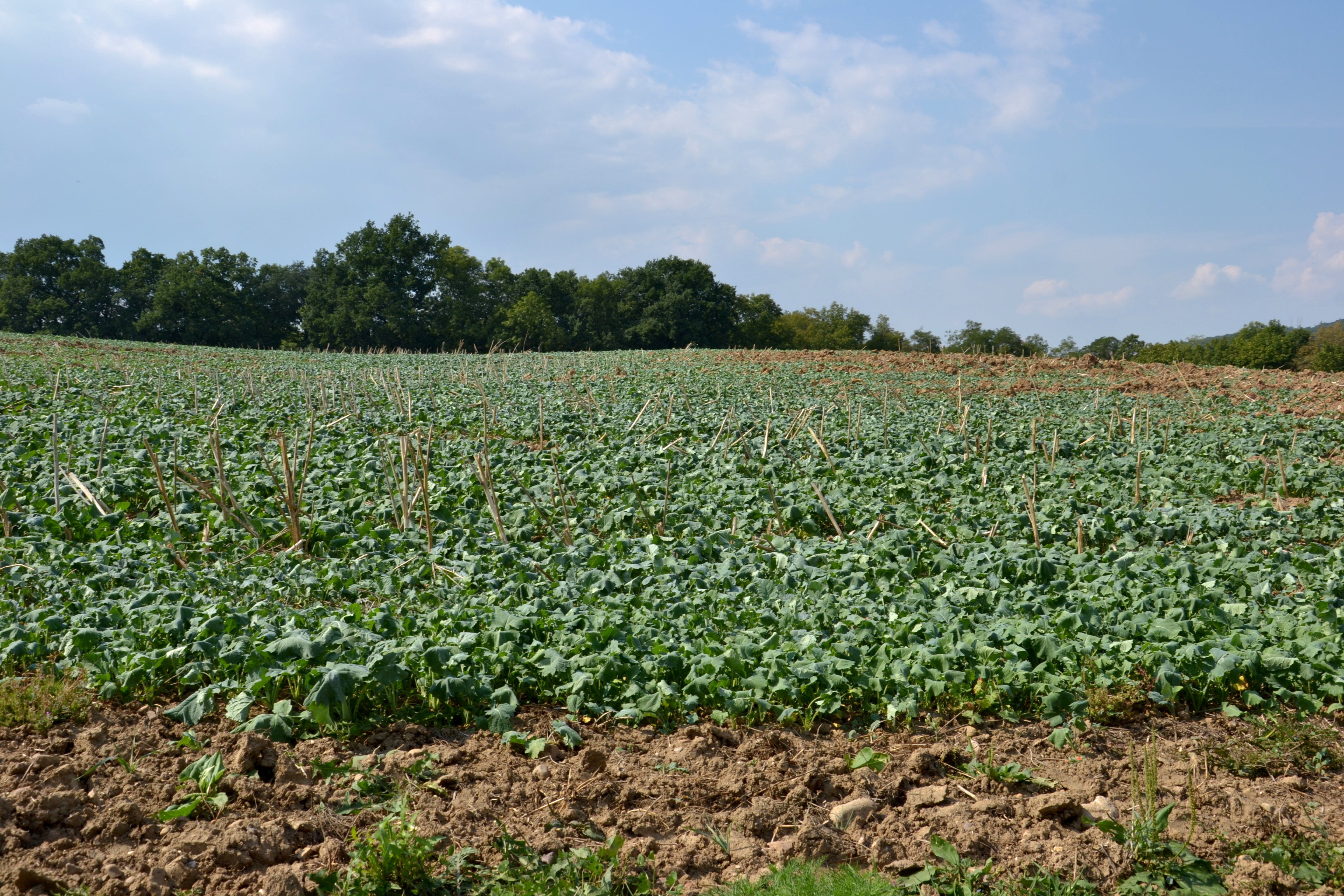 Terénní vlna, která vznikla rozvezením třetí hradby